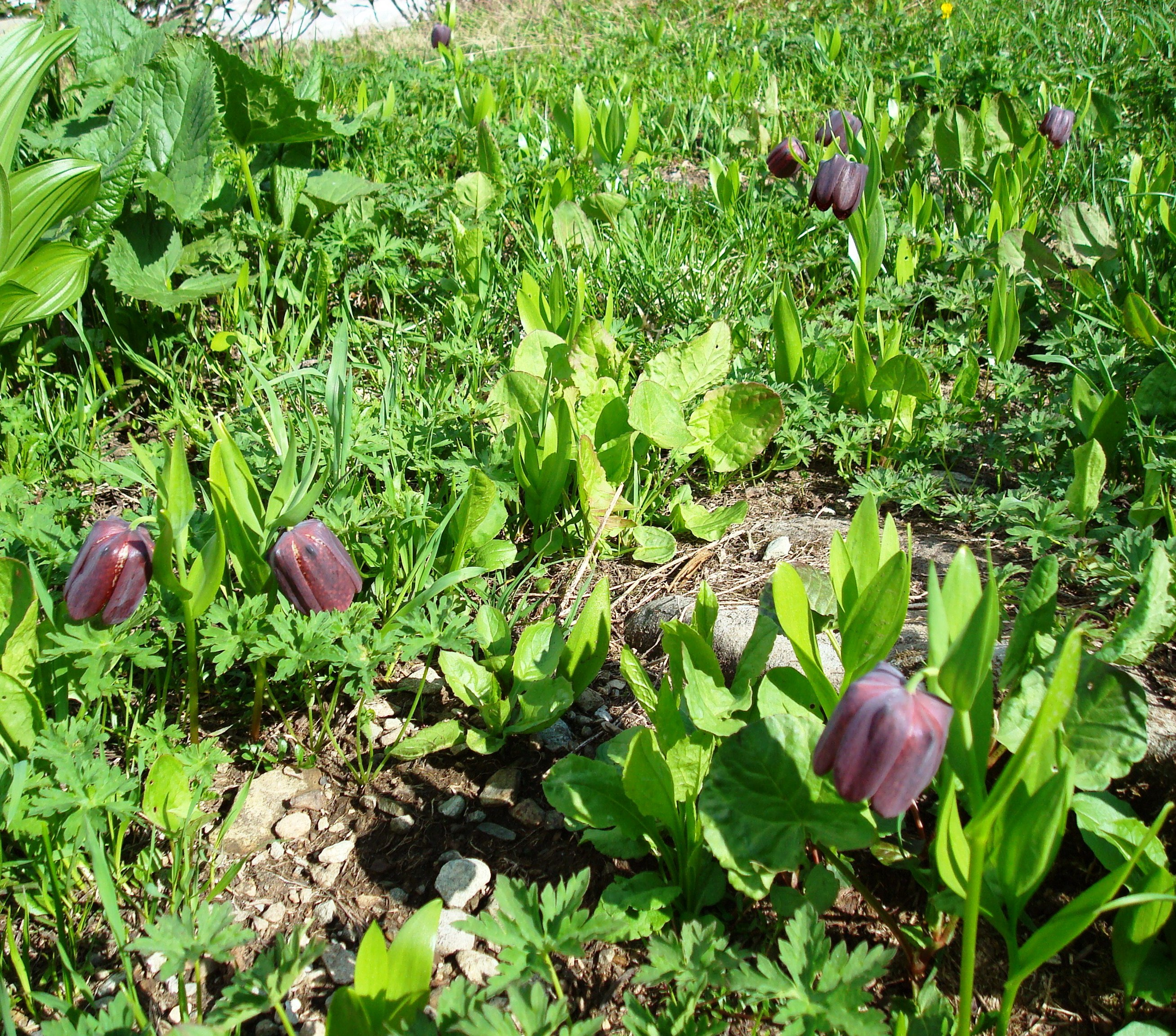 Рябчик широколистный на склонах горы Ачишхо. Сочинский национальный парк, Сочи. Исчезающий колхидско-кавказский эндемичный вид. Занесён в Красную книгу.Fritillaria latifolia on Mount Achishkho slopes. Endemiс species. It is included in the Red List. The photo was taken on Mount Achishkho slopes in vicinities of Krasnaya Polyana, Sochi National Park. This image is related to the protected area of Russia number 2300355